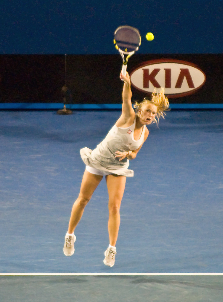 Caroline Wozniacki